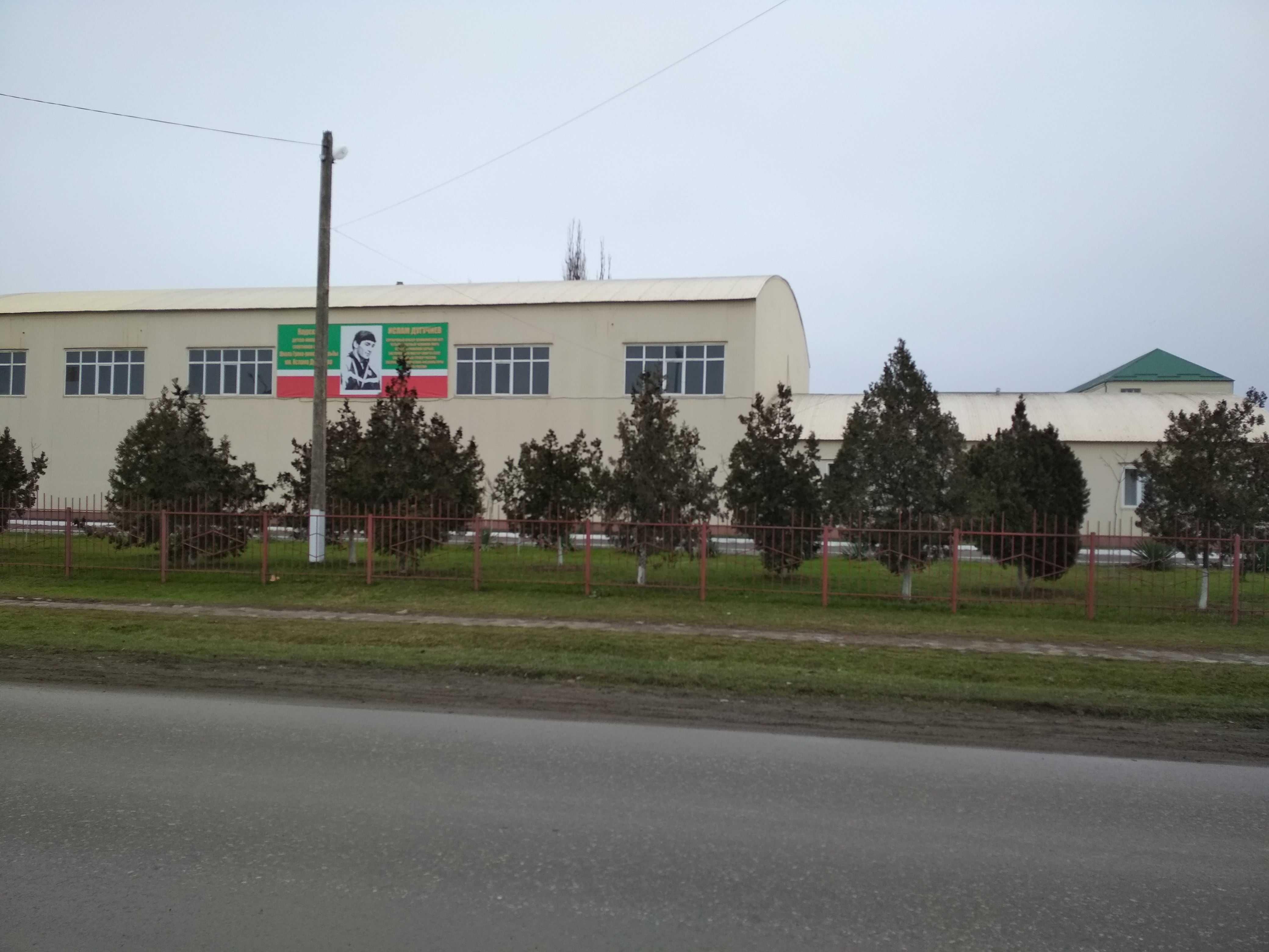 Нохчийн: Новр-ГӀалара Дугучиев Исламан цӀарах йолу спортан комплекс